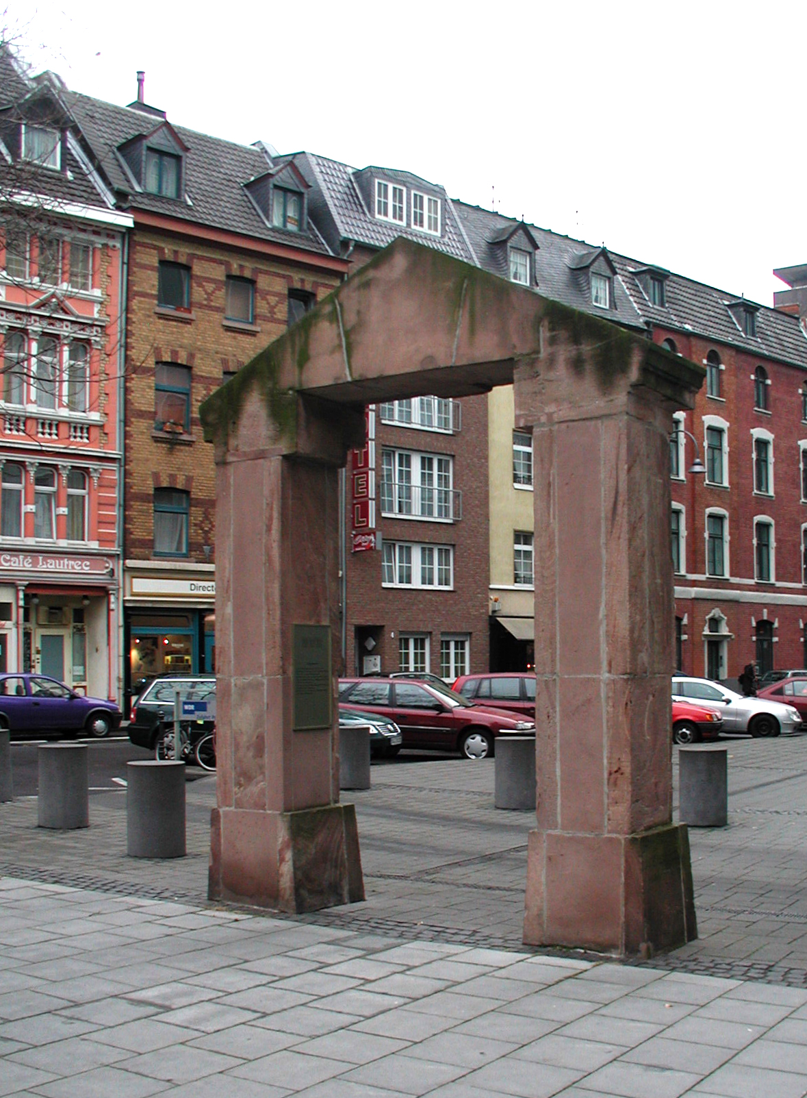 Köln, Portal-Notariat-Decker, Ecke Neven-DuMont-Straße/Kupfergasse This is a photograph of an architectural monument.